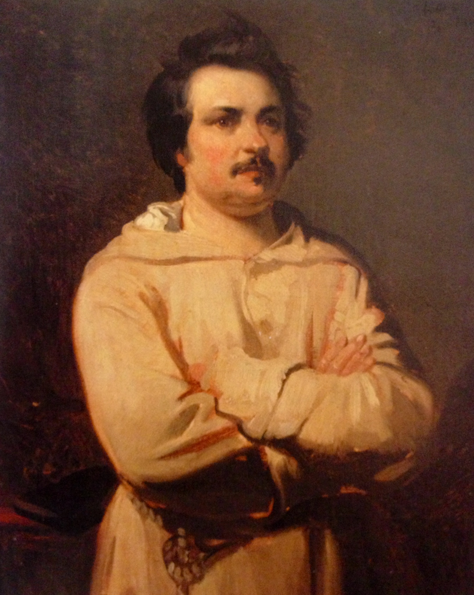 Portrait original